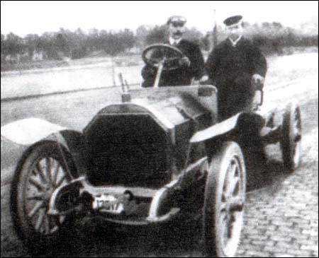 Imperia rond eeuwwisseling